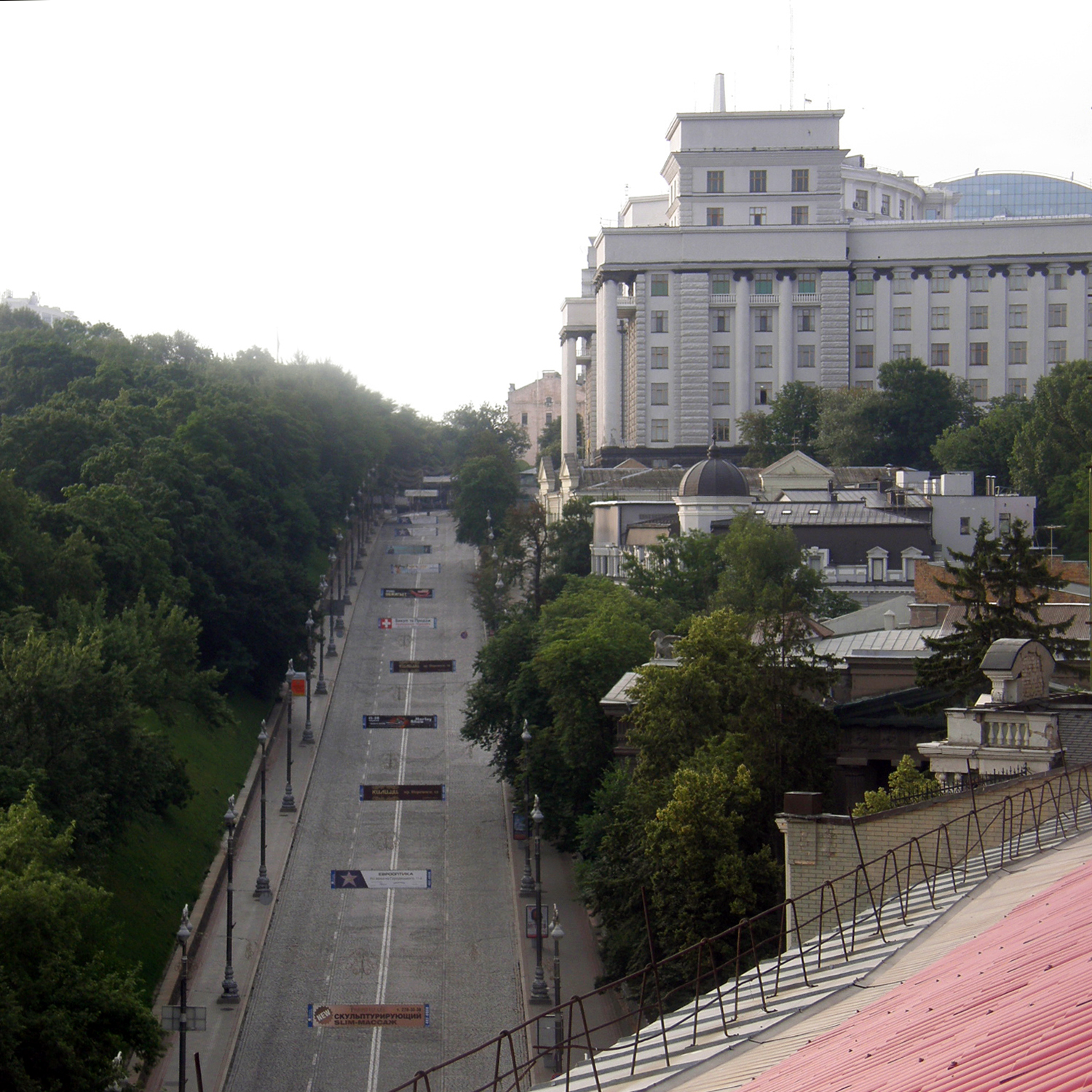 улица Грушевского вверх от Музейного переулка